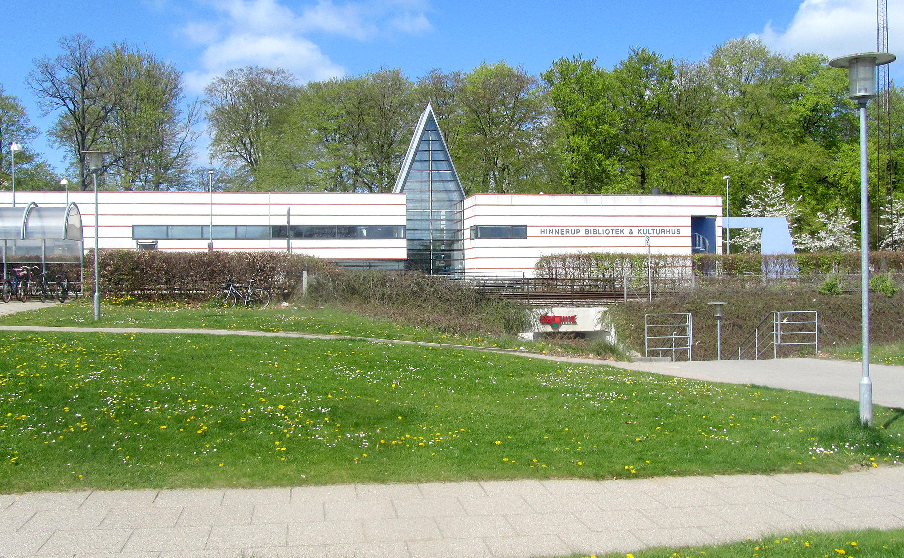 Hinnerup Bibliotek